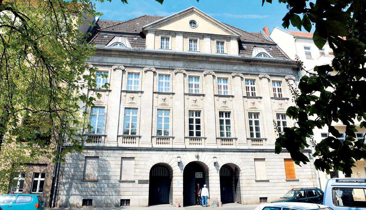 Lessing-Gymnasium in Berlin-Mitte, Schöningstraße 17